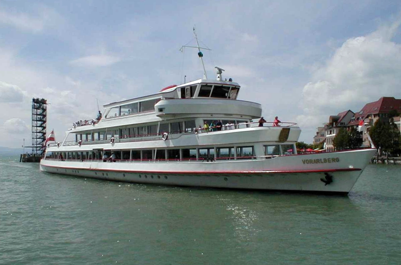 MS Vorarlberg im Hafen von Friedrichshafen